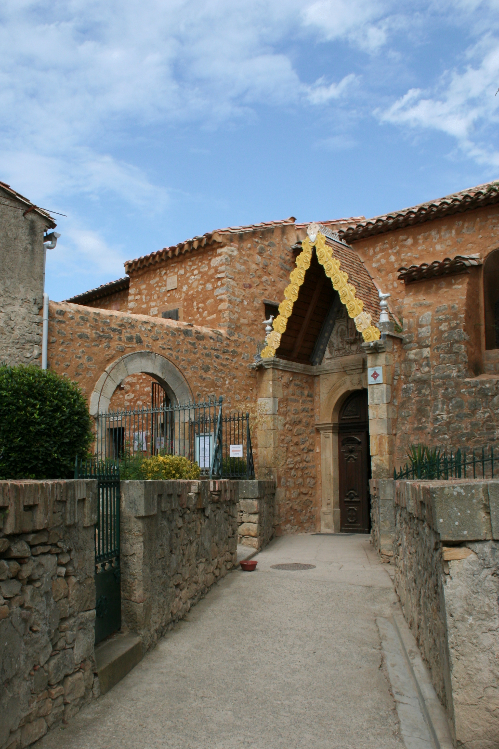 Eglise Sainte-Marie-Madeleine, à Rennes-le-Château (Aude, Languedoc-Roussillon)